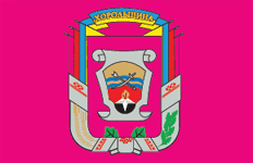 Прапор Хорольського району